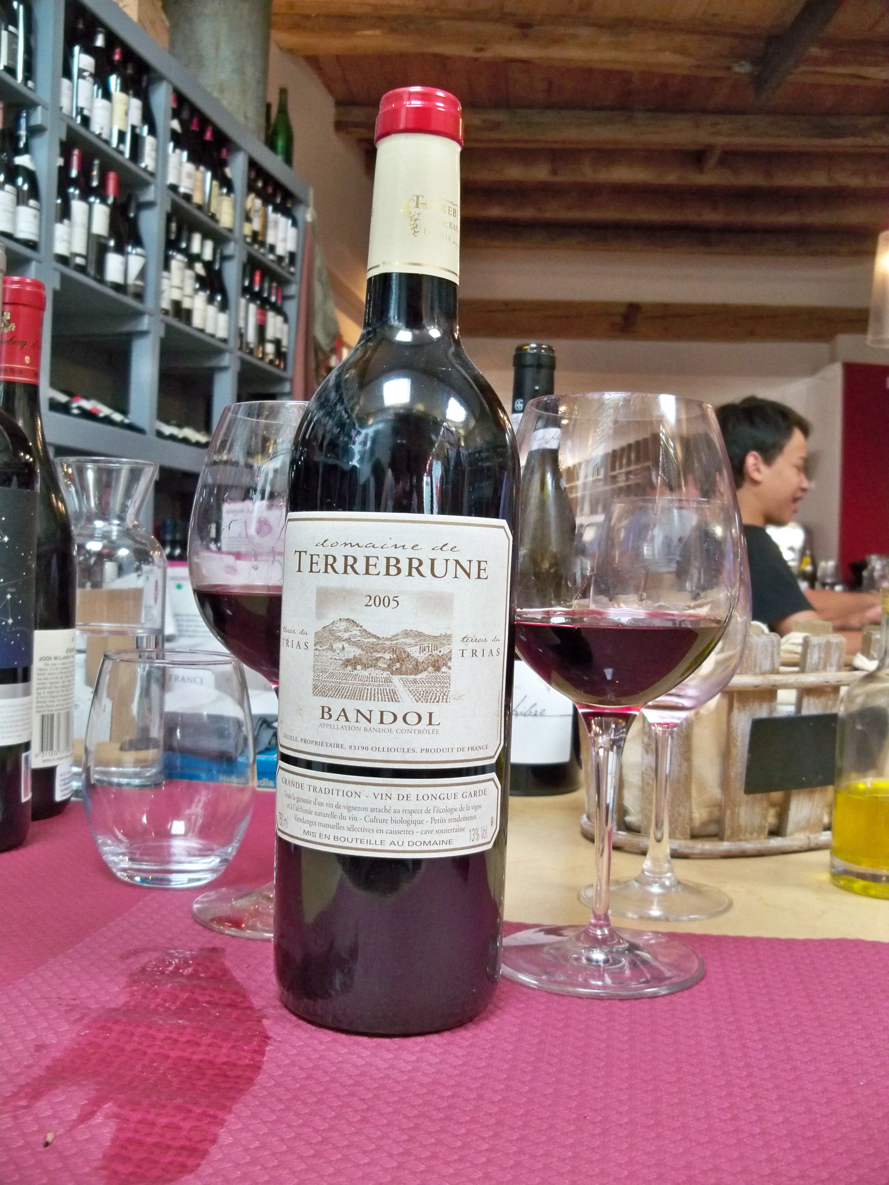 Bouteille de Bandol rouge